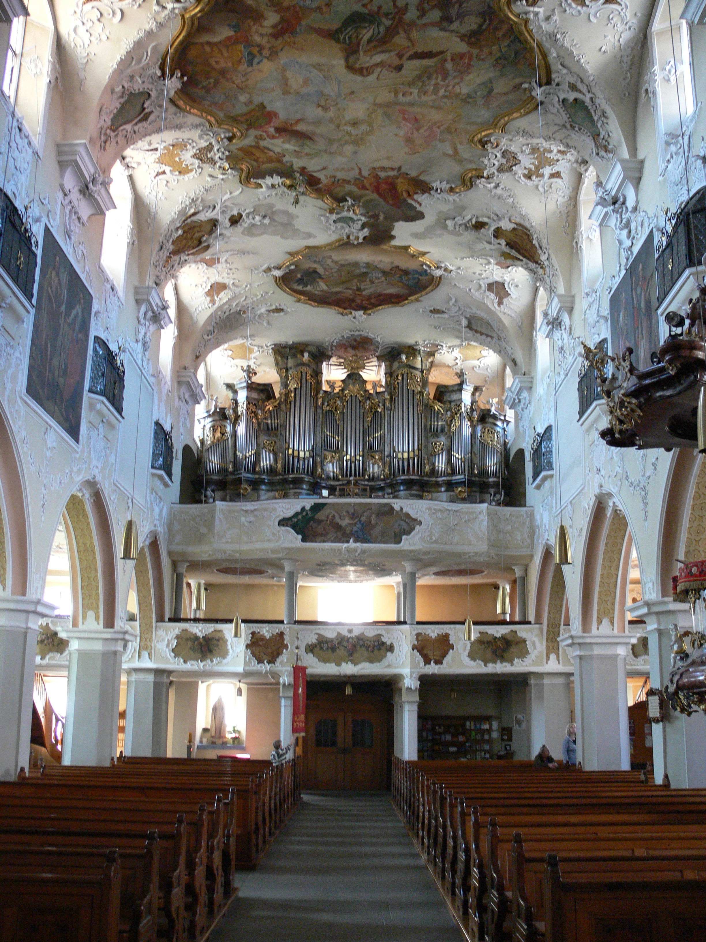 Pfullendorf, Stadtkirche St. Jakob Blick zur Empore